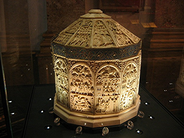 Musée de Sens, Yonne, France : la sainte châsse, VIe siècle